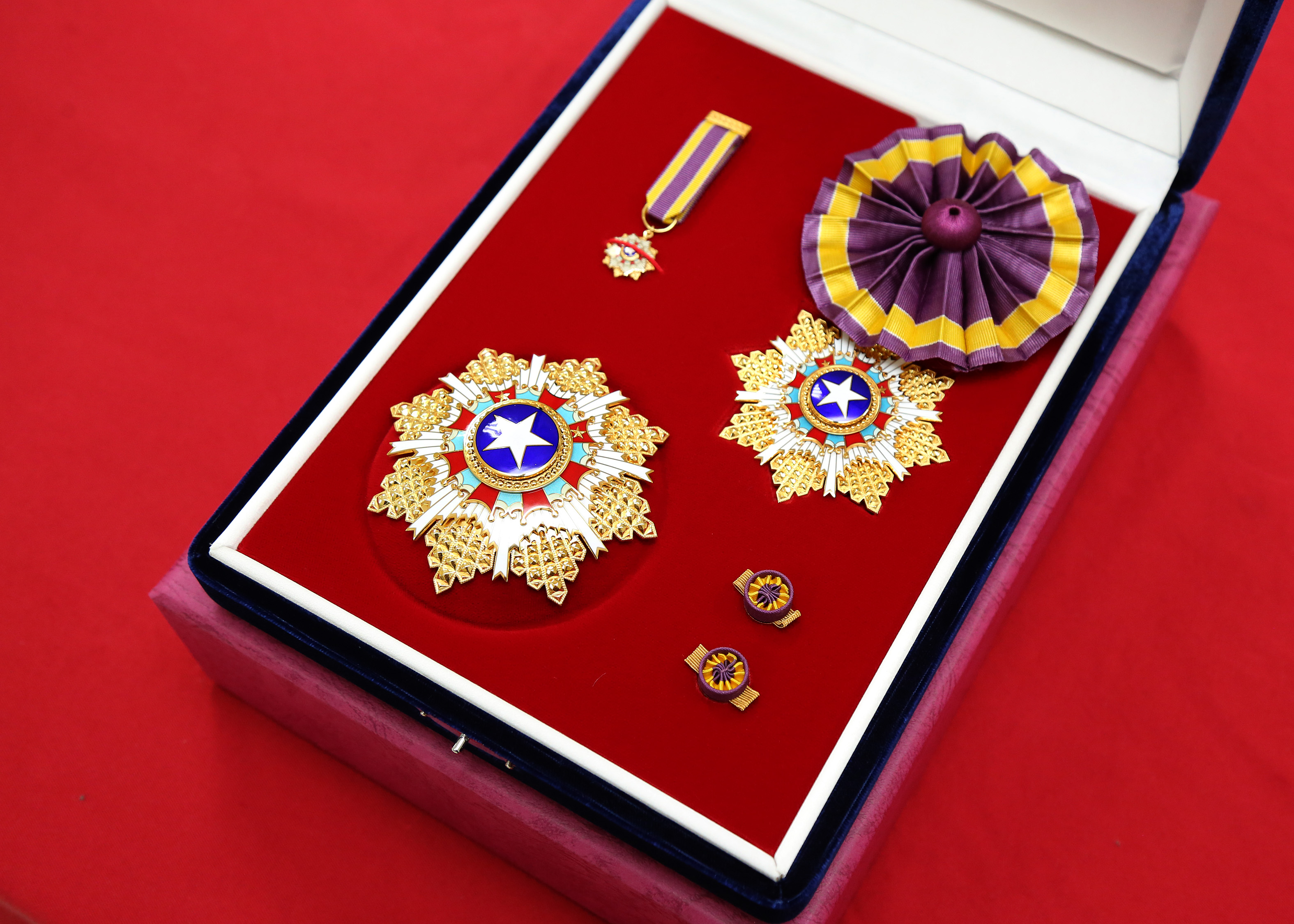 中文（台灣）: 中華民國總統馬英九頒給資深書畫藝術家張光賓的二等景星勳章。